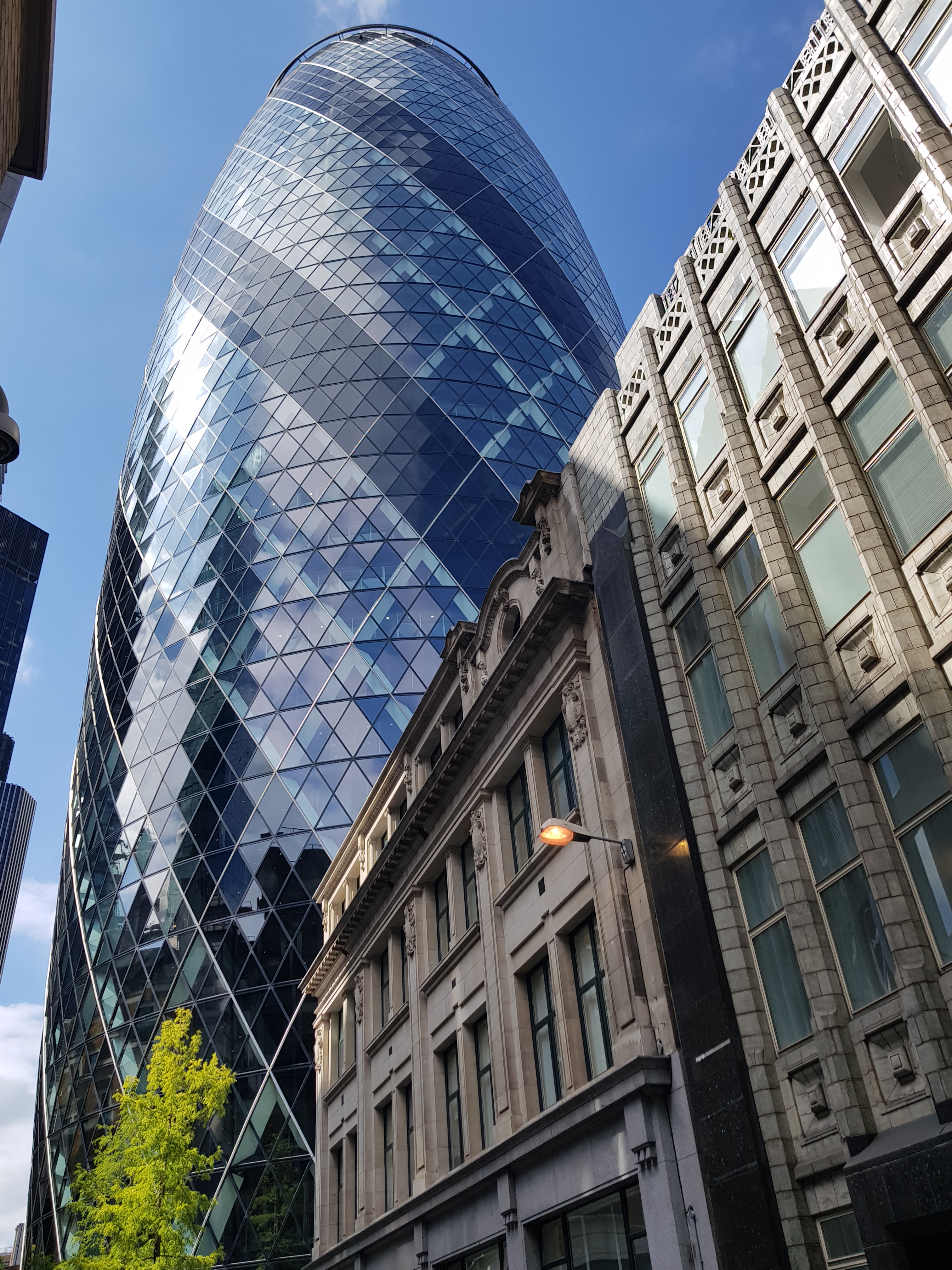 Le "Gherkin", Londres.